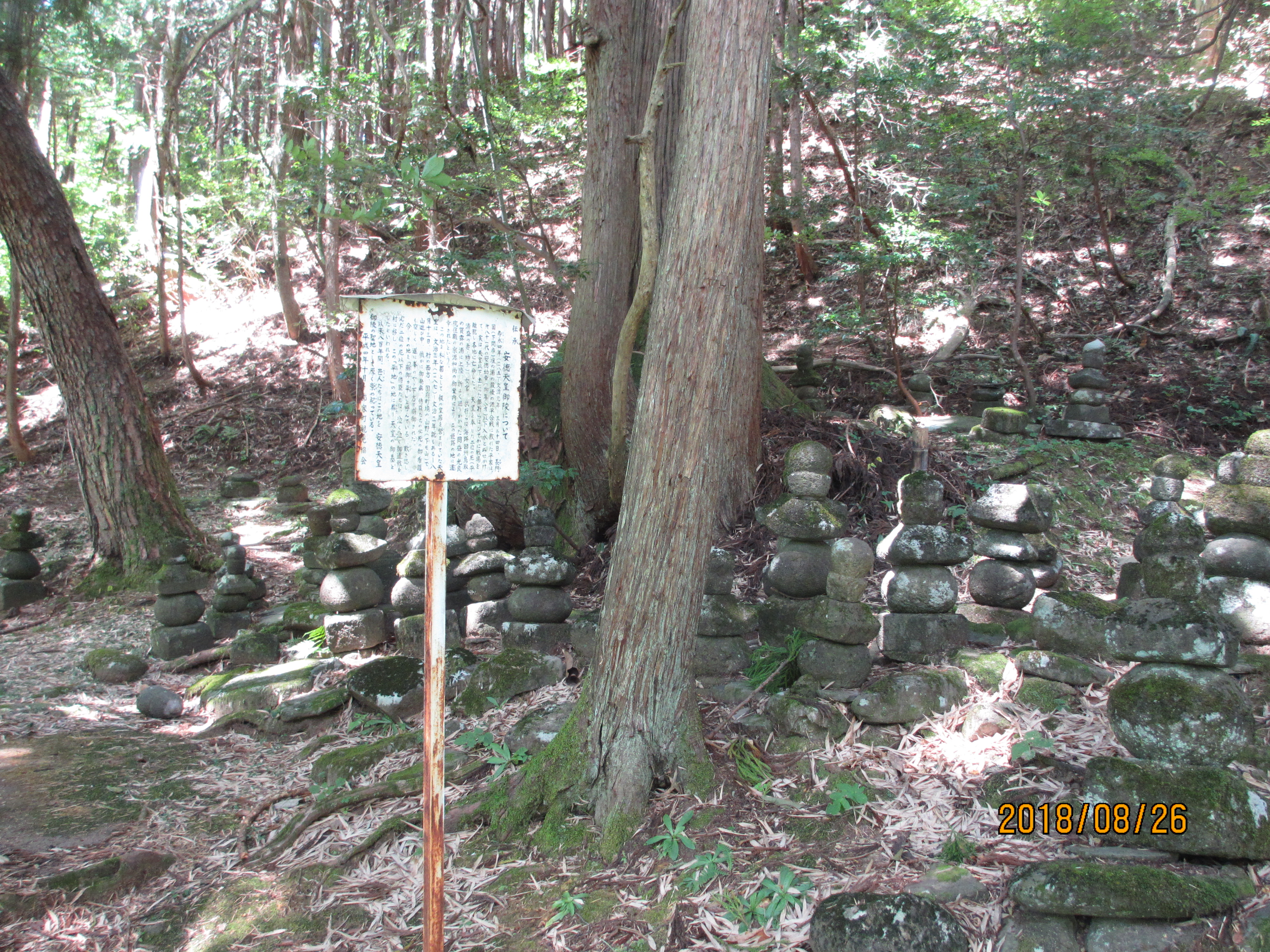 鳥取県八頭郡八頭町姫路12